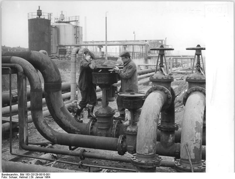 Zentralbild-Schaar 29.1.1964 Erdölentladung im Leuna II in Betrieb genommen. Die Erdölentladungsstation wurde am 27.1.1964 für die Probebetrieb angefahren. Damit ist in Leuna II die Erdölentladungsstation als weiteres wichtiges Teilobjekt in Betrieb gegangen. Im Probebetrieb entleert die von einer Zentrale automatisch gesteuerte moderne Anlage täglich 30 Kesselwagen Erdöl in die bereits fertiggestellten fünf riesigen Tanks. Bereits in einigen Wochen wird hier sämtliches in den Leuna-Werken zu verarbeitendes Erdöl entladen werden, wobei dann die veraltete Anlage in Leuna I stillgelegt wird. Nach der Fertigstellung der Kesselwagenrestentleerung wird Mitte Februar das gesamte Tanklager der ersten Ausbaustufe von Leuna II mit seinem kilometerlangen Rohrleitungsnetzt der Zu- und Abführung voll funktionsfähig sein. In diesen Wochen vollbringen die Bau- und Montagearbeiter und alle weiteren Arbeitskräfte auf dem riesigen Gelände der Großbaustelle gewaltige Leistungen im Ringen mit den Witterungsunbilden.